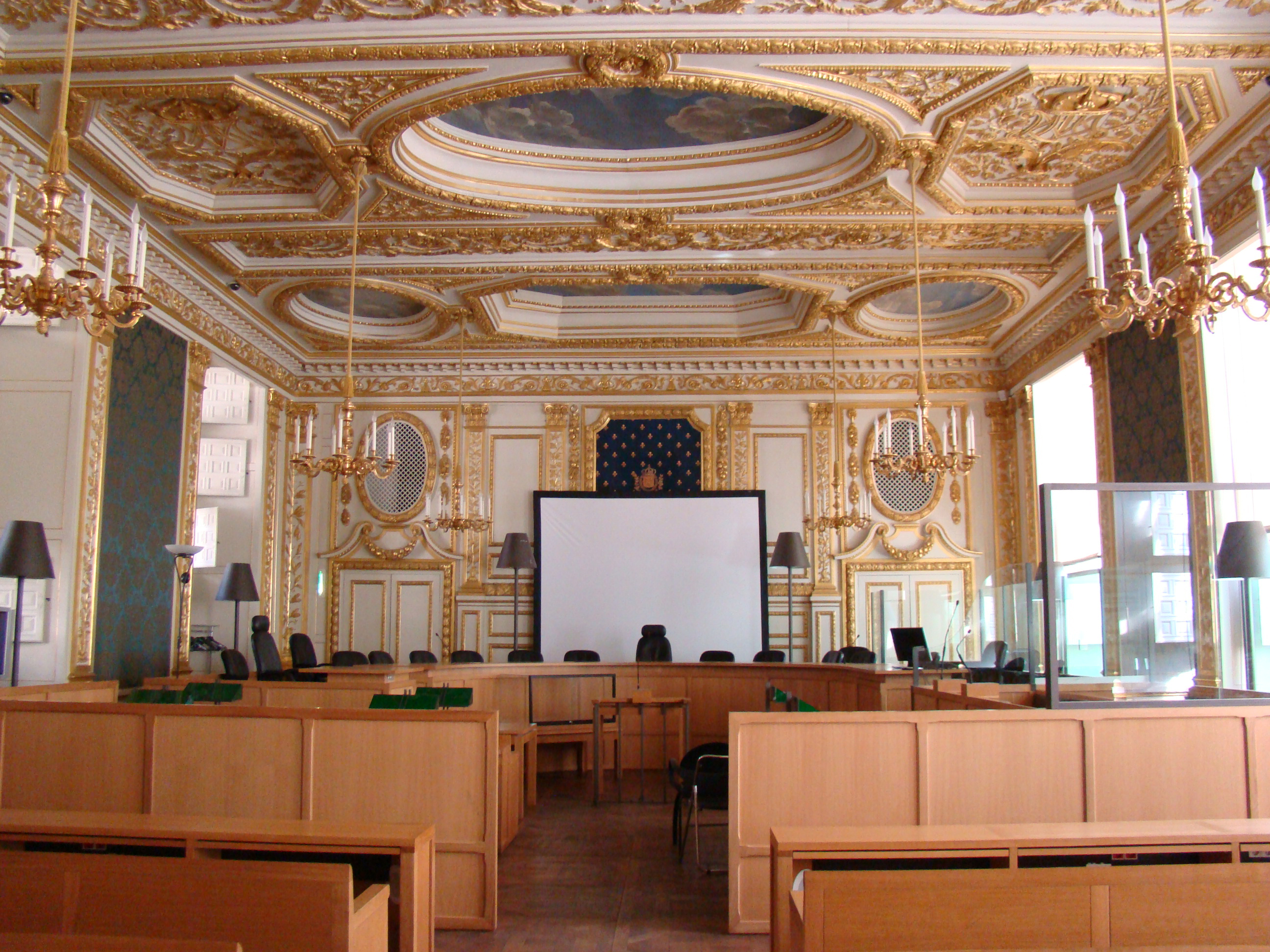 Cour d'assise du Parlement de Bretagne.